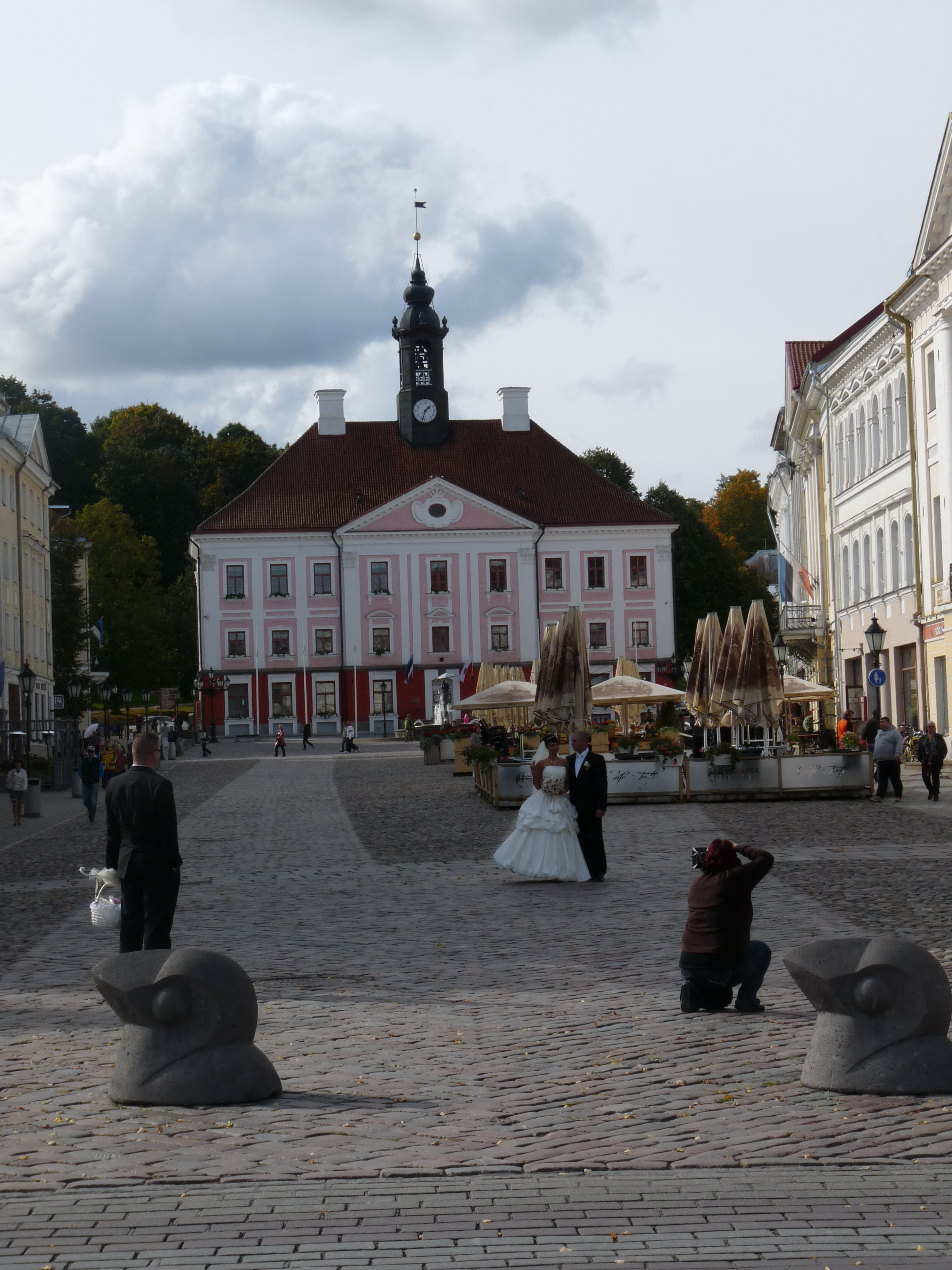 Pruutpaar pulmafotograafi ees Tartus Raekoja platsil, 22. september 2012